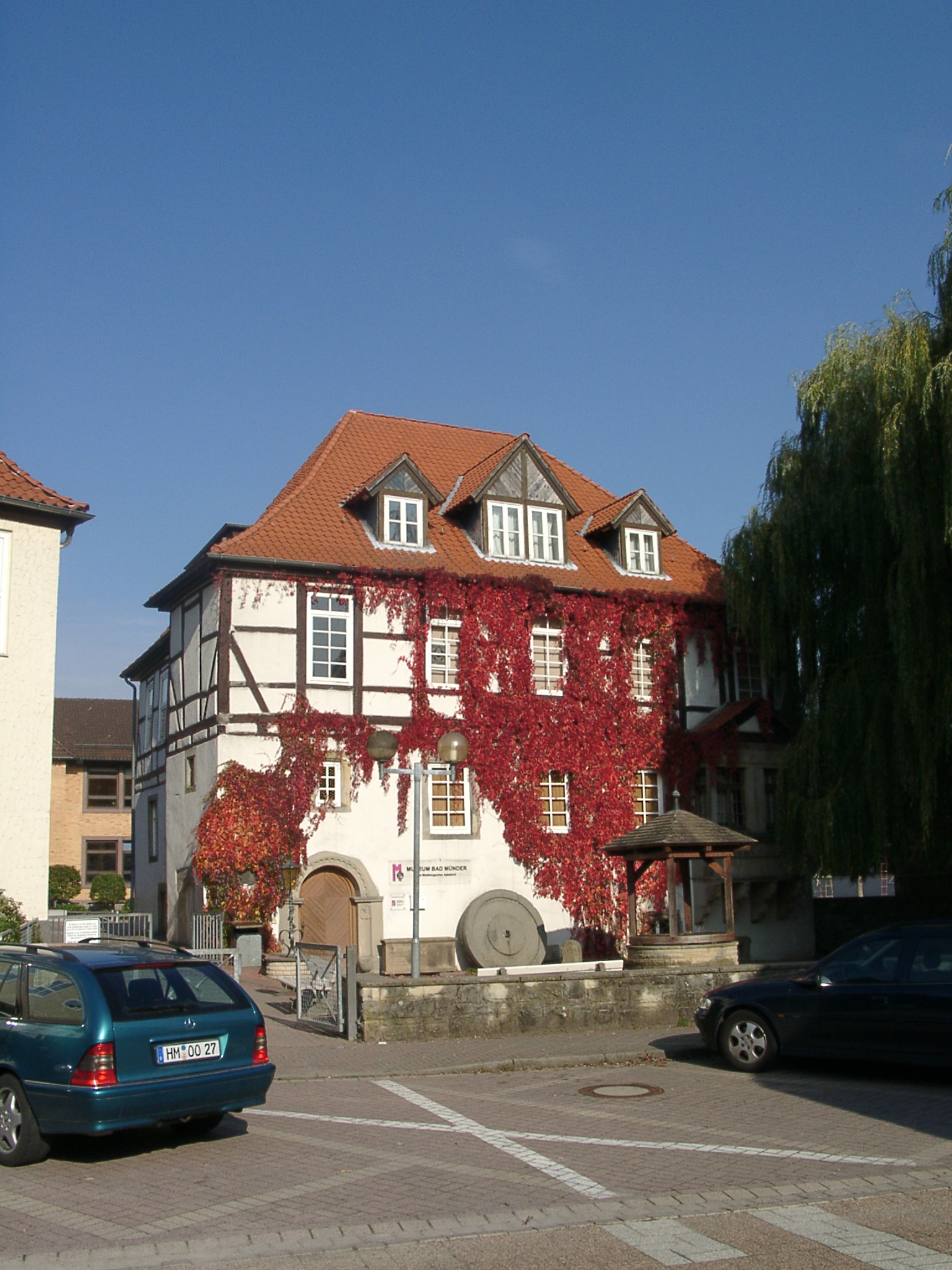 Museum von Bad Münder